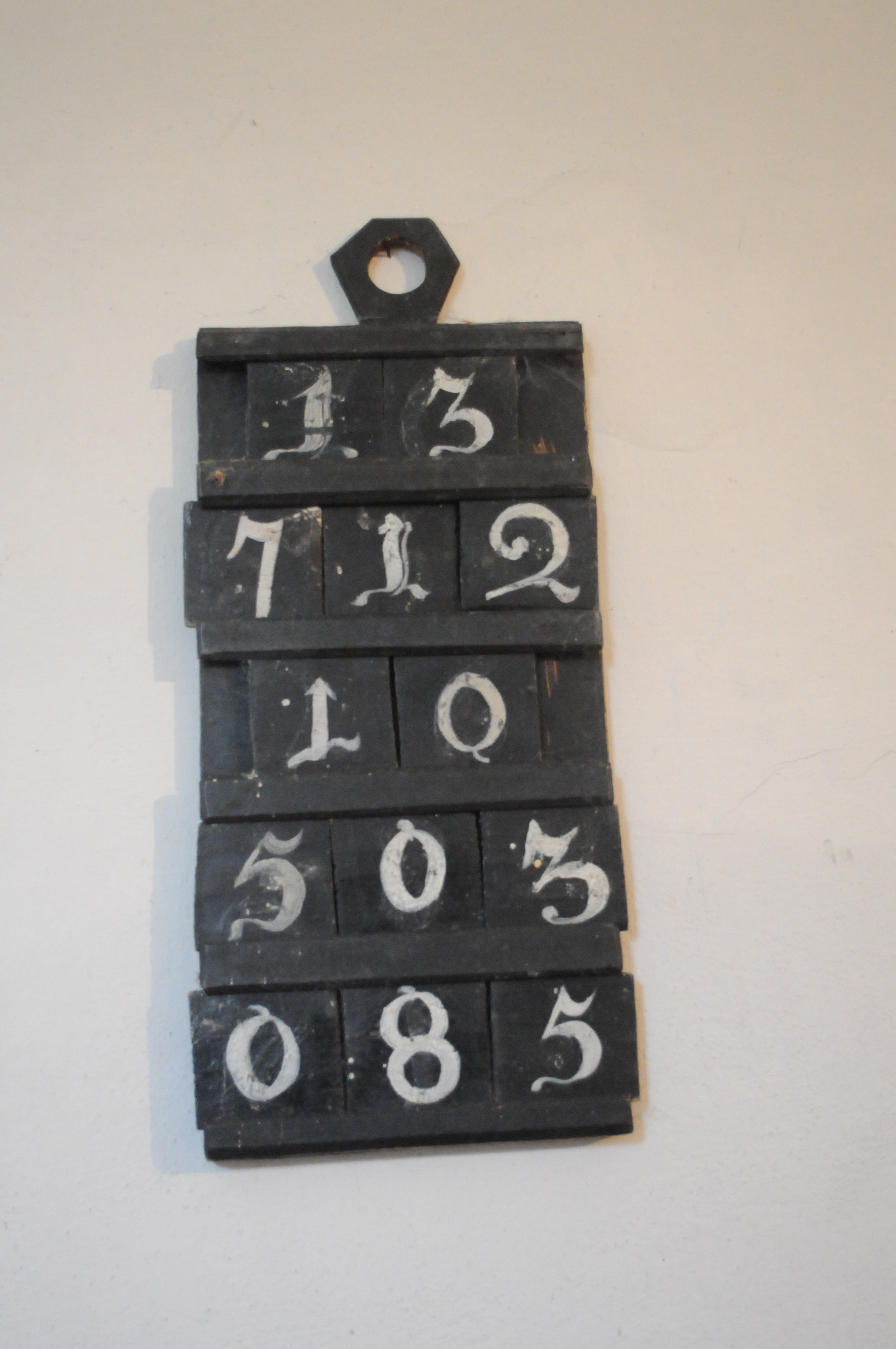 Liedanzeiger in der Glaubenskirche Sankt Johann am Tauern